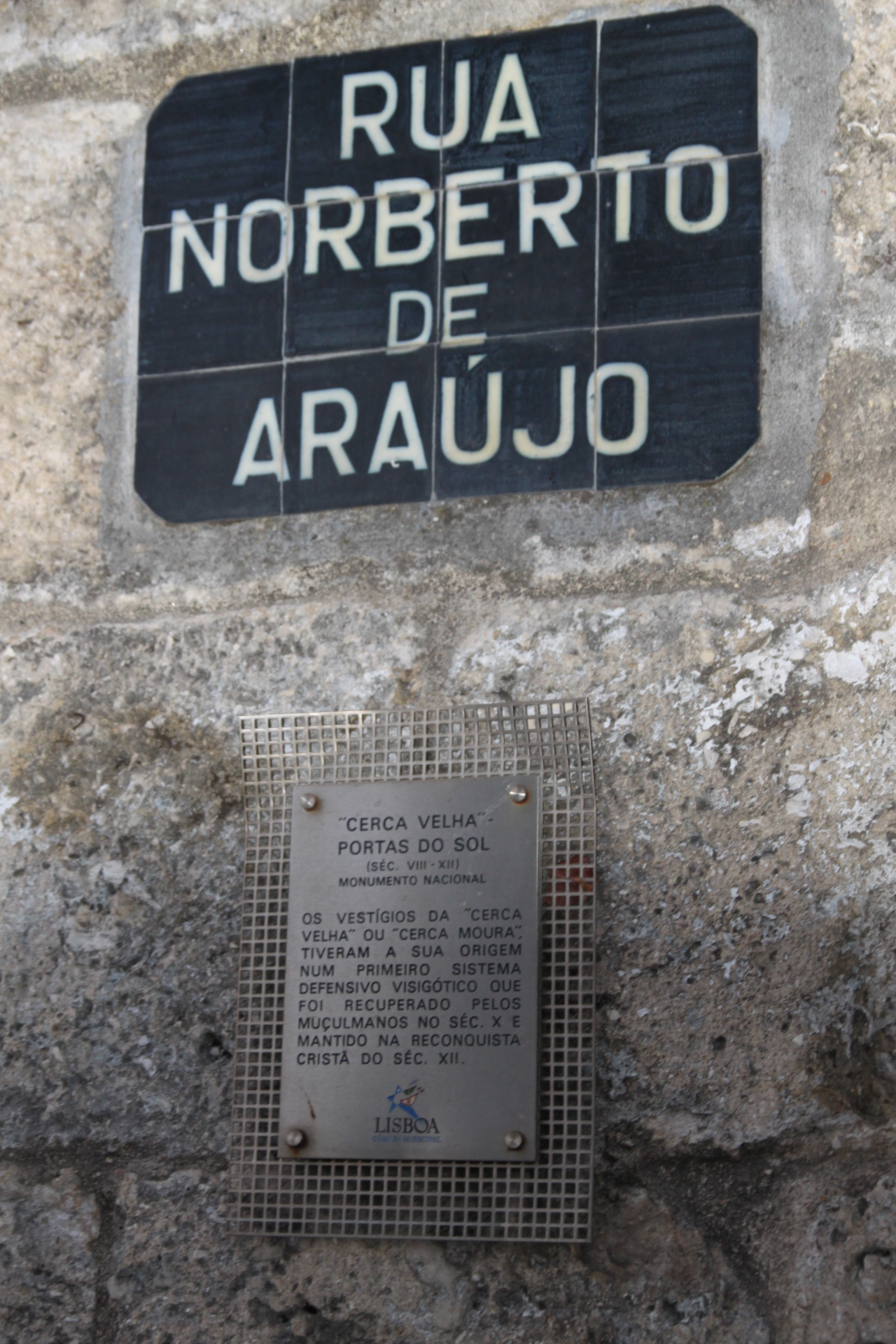 Pormenor da cerca de Lisboa com placa informativa, sob azulejo toponímico da Rua Norberto de Araújo.